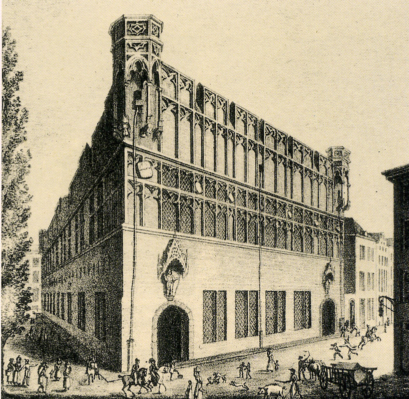 Der Gürzenich von Südosten, 1827, Lithographie von A. Wünsch nach einer Zeichnung von J. P. Weyer, 25 x 20 cm; Kölnisches Stadtmuseum